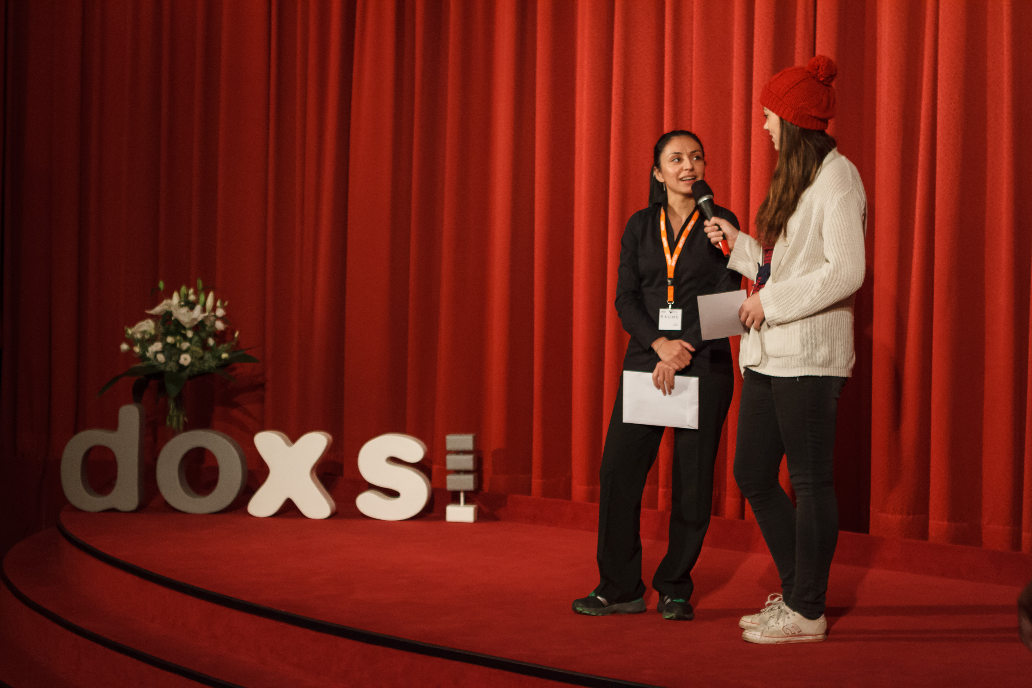 Preisverleihung beim Festival doxs! Duisburg,2012